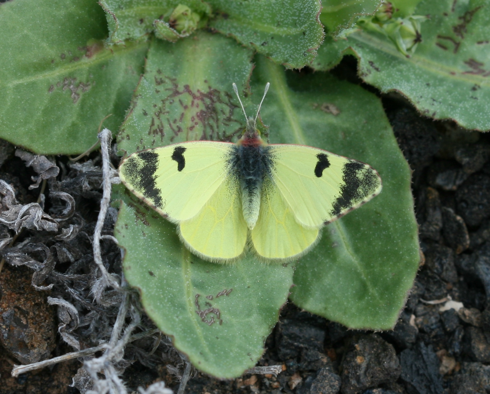 Taken near Montaña Roja, Playa Blanca, Lanzarote.